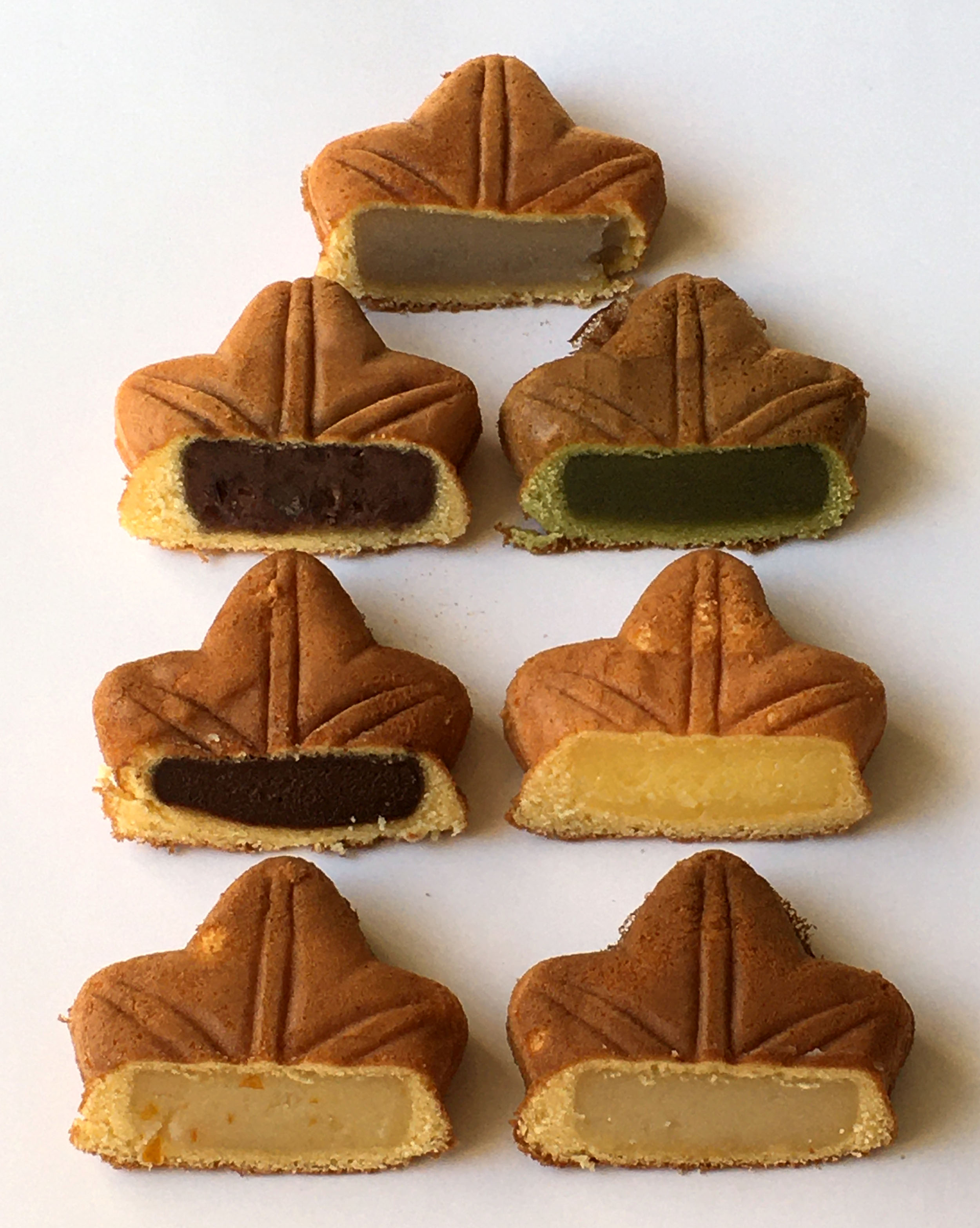 やまだ屋 もみじ饅頭 一番後ろが無印、その手前の左がつぶあん、右が抹茶、あと順にチョコ、クリーム、みかん、レモン